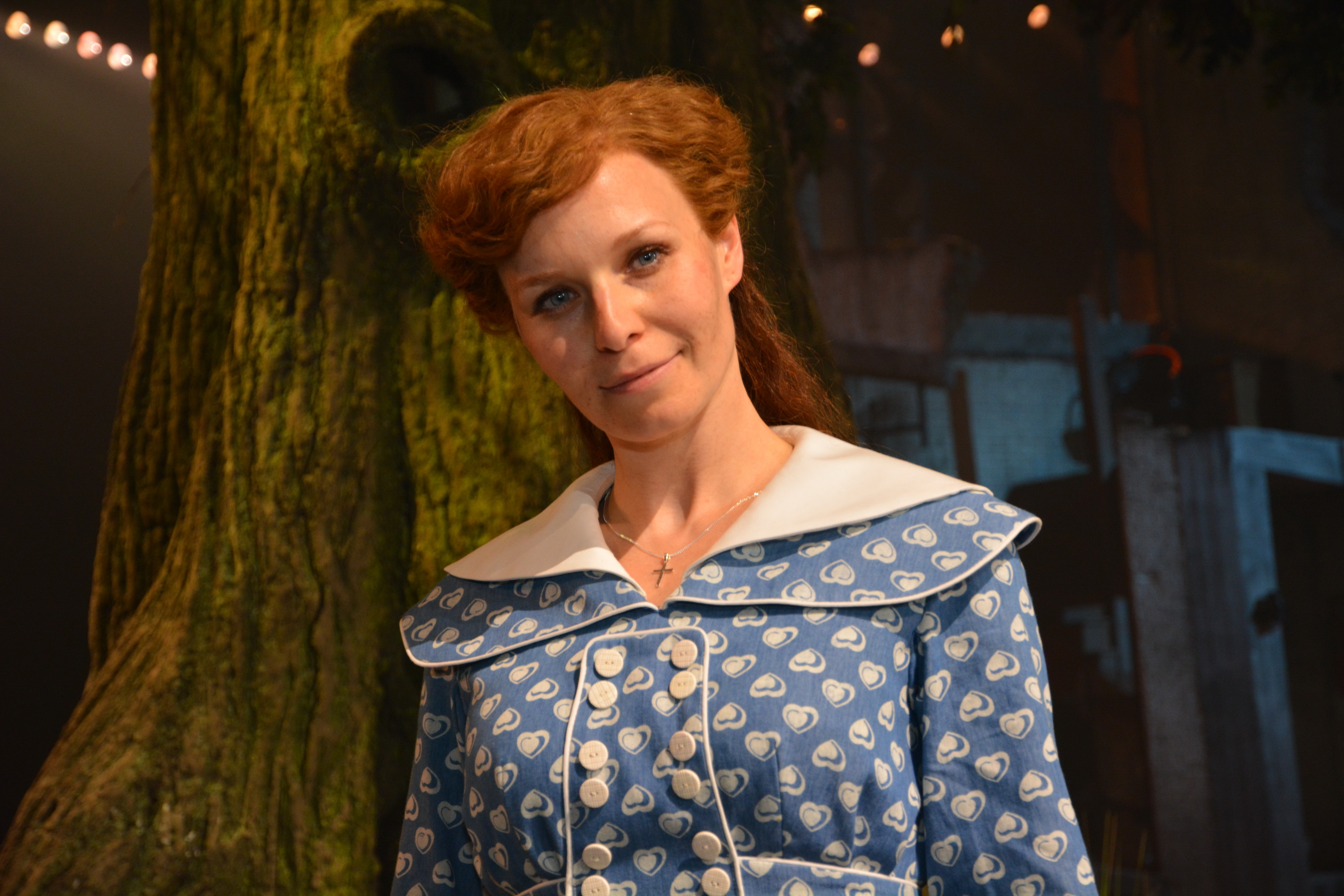 Free Souffriau tijdens de open repetitie van de spektakelmusical 14-18